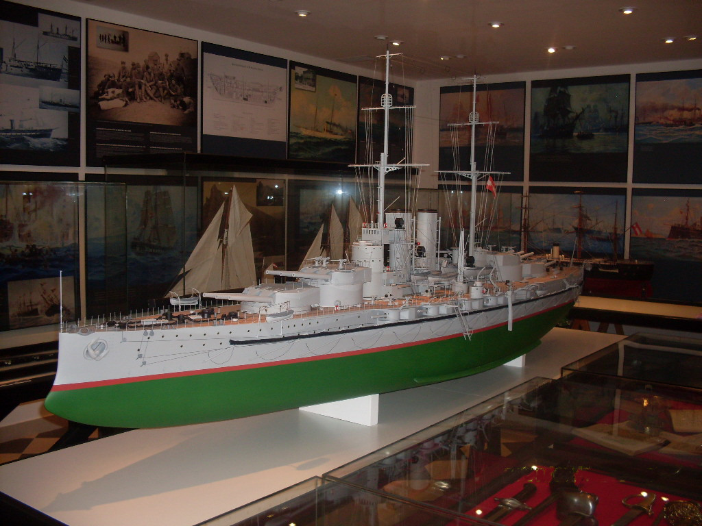 Modell der SMS Szent István im k.u.k. Marine Museum Novigrad (Kroatien)